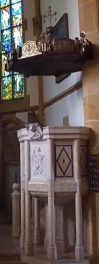 Kanzel mit Schalldeckel in der Heilig-Kreuz-Kirche in Röthenbach an der Pegnitz (gefertigt nach einem Entwurf Heinrich Hauberrissers)